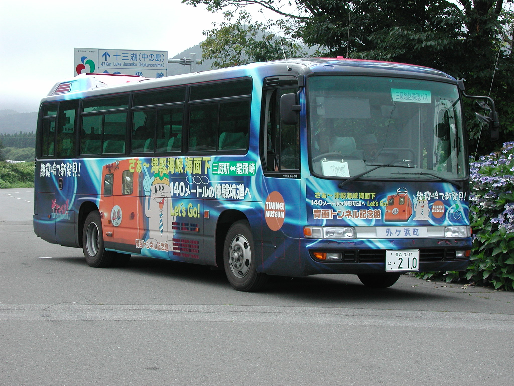 外ヶ浜町三厩地区循環バス車両 - 日野・メルファ 三厩駅にて